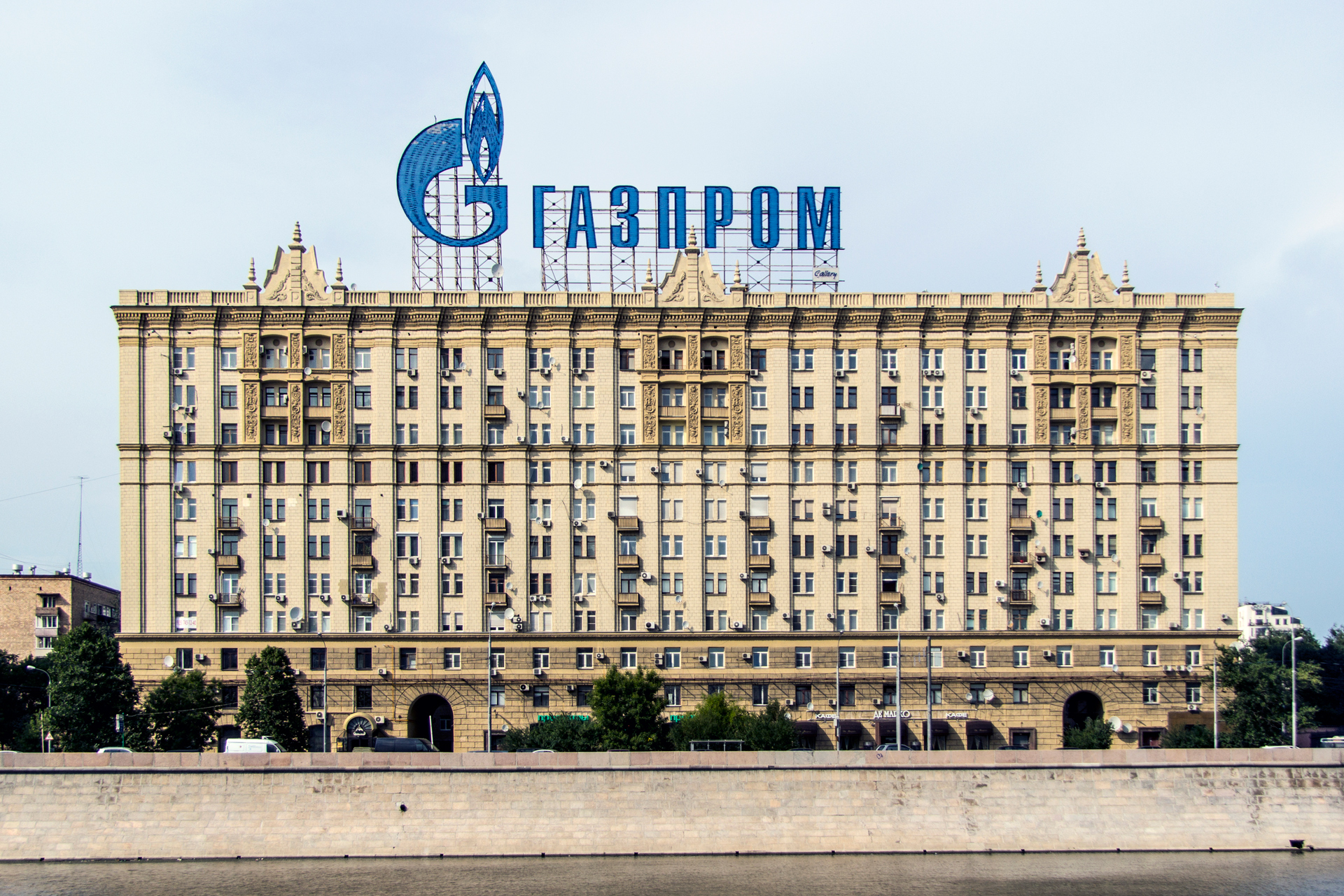 Krasnopresnenskaya Embankment 2/1, Moscow, Russia